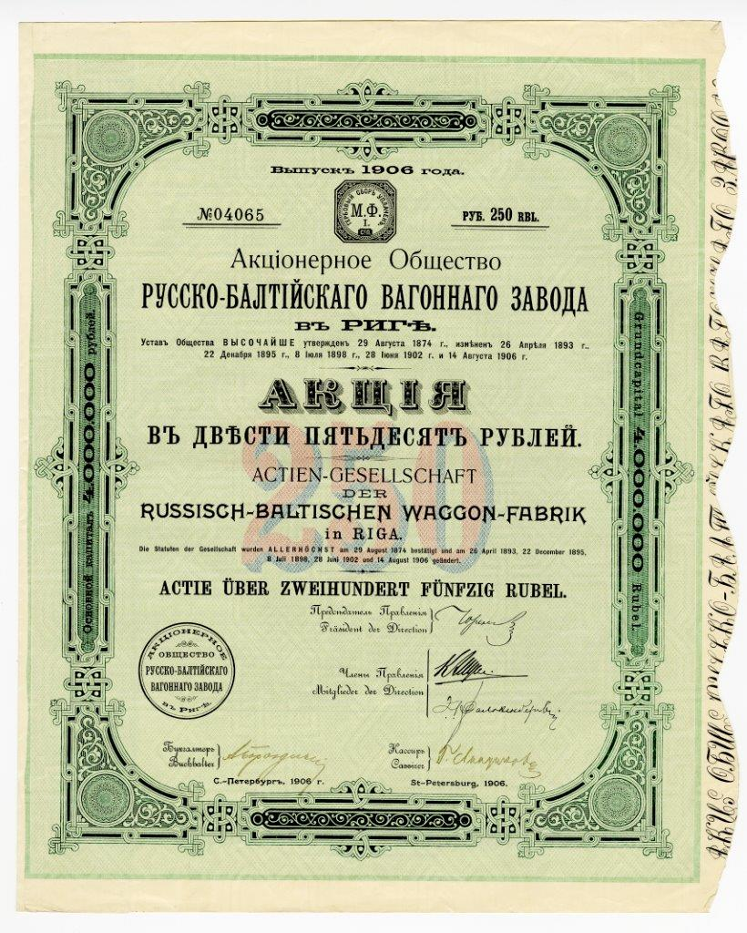 Акция в 250 руб. на предъявителя Акционерного общества Русско-Балтийского вагонного завода с основным капиталом в 4 млн. руб. С.-Петербург, 1906 г.